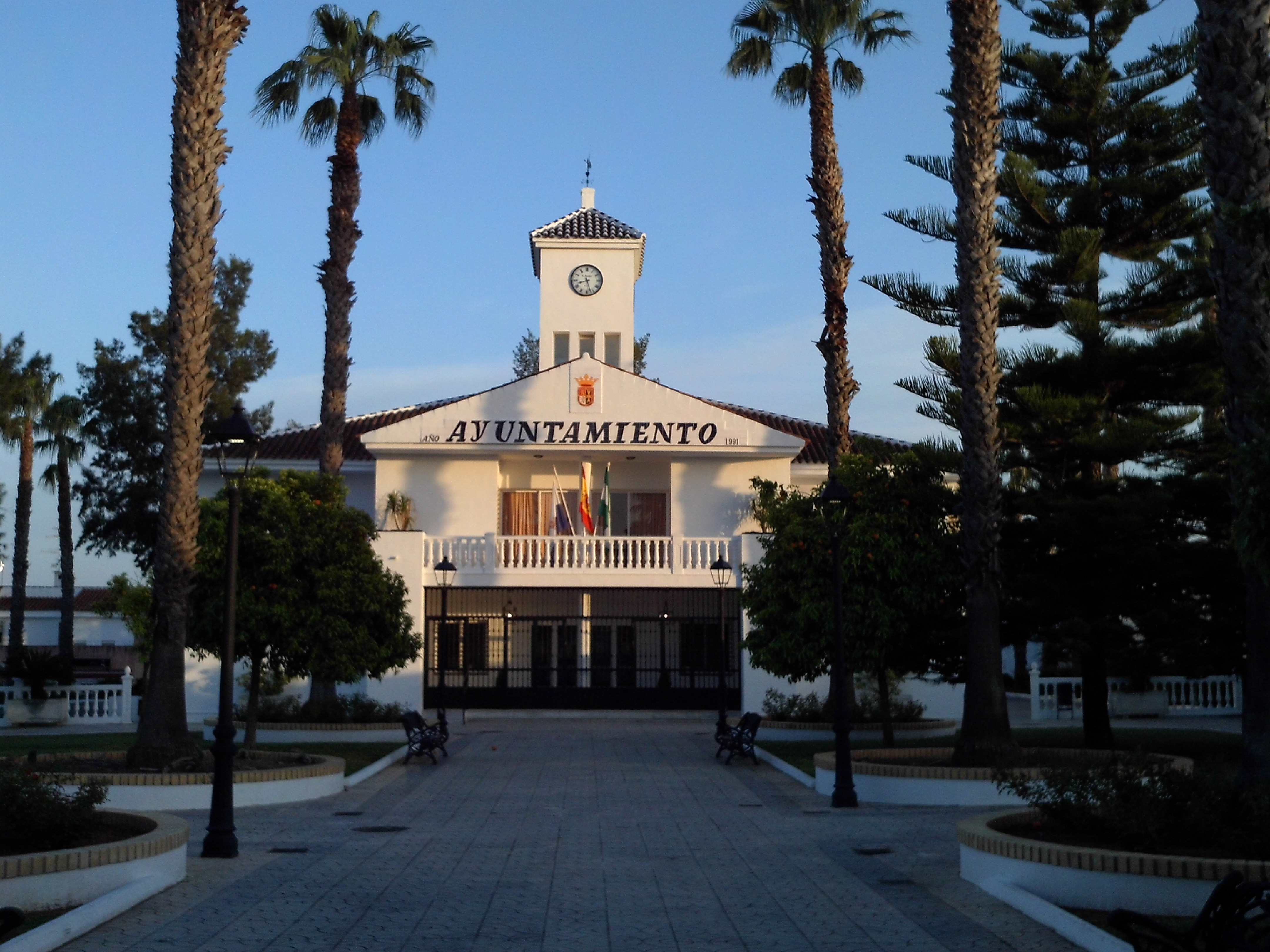 Ayuntamiento de Espartinas, en la provincia de Sevilla